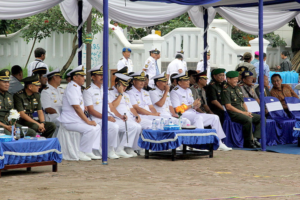 Kota Cirebon, Jum’at ( 20/12/2013 )- Jabatan Komandan Pangkalan TNI AL ( Lanal ) Cirebon di serahterimakan dari pejabat lama Letkol Laut ( S ) Gatot Sugiarto, SE kepada pejabat baru Letkol Laut ( P ) Deny Prasetyo dihadapan Danlantamal III/ Jakarta Brigjen ( Mar ) Ikin Sodikin, melalui sebuah Upacara Militer di Alun Alun Kejaksan Kota Cirebon, Jum’at ( 20/12/2013 ).